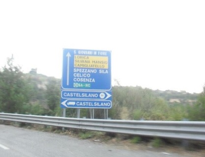 Cartello della SS 107 dello svincolo di Castelsilano in direzione Cosenza-Paola